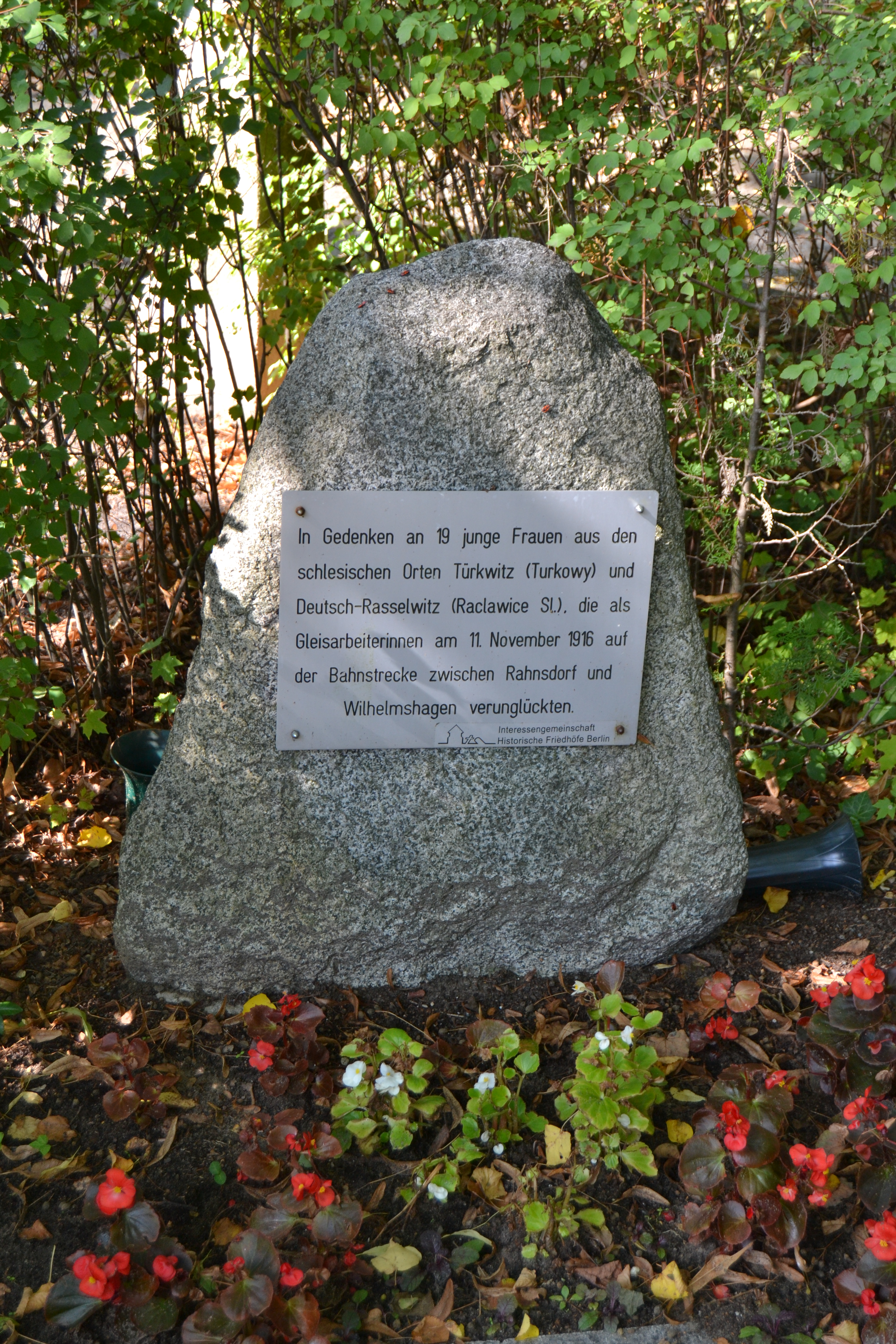 Friedhof Rahnsdorf - Gemeinschaftsgrab für 19 1916 verunglückte schlesische Zugunglücksopfer